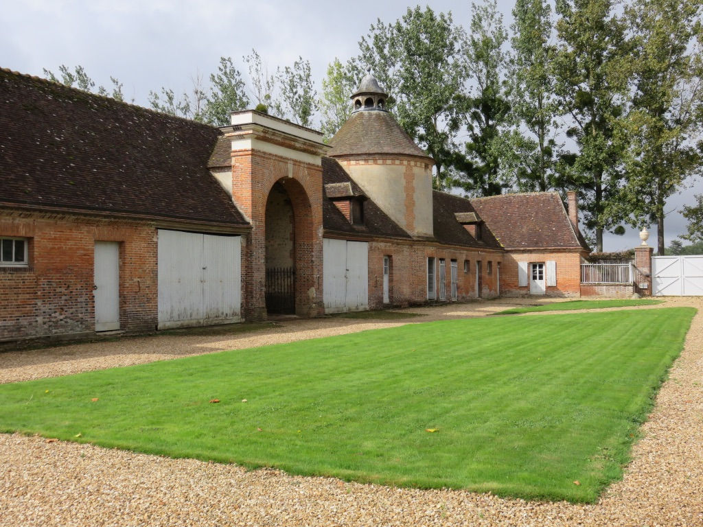 Le château a été construit vers 1785, le colombier et le porche sont plus anciens, ils existaient du temps du logis seigneurial.